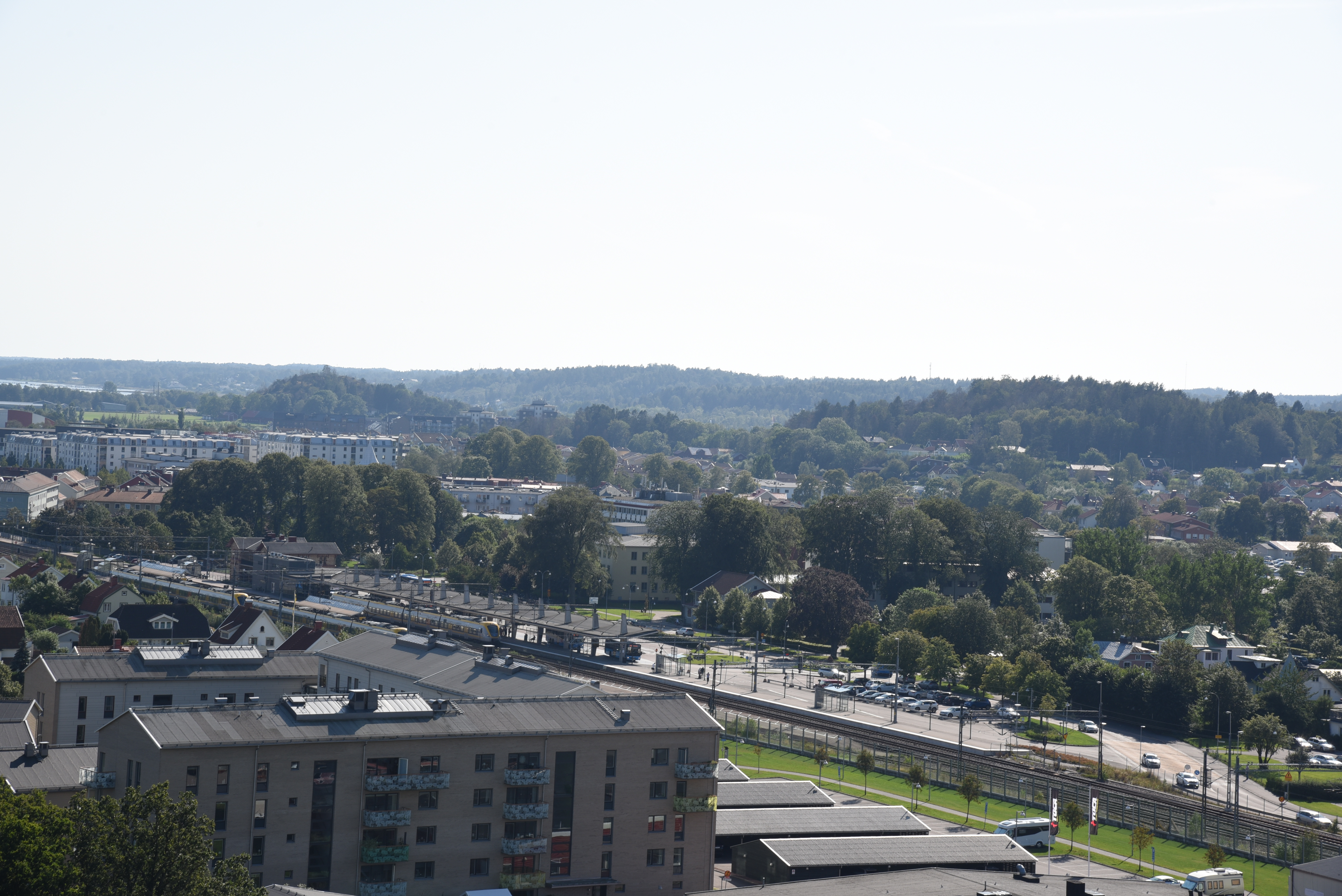 Utsikt över Kungsbacka från Tölöbergs vattentorn, riktning sydväst mot centrum.